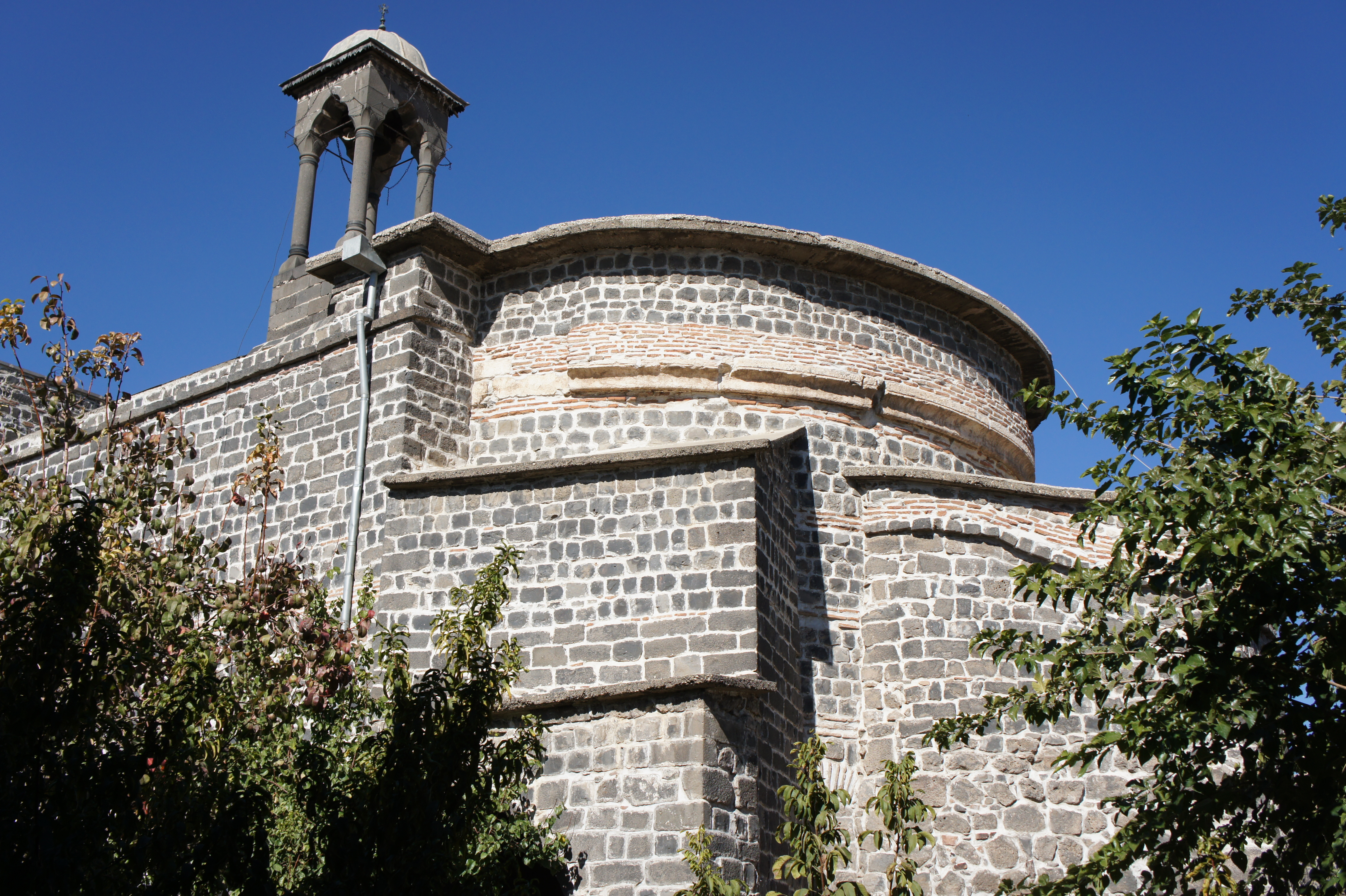 Kurdî: Dêra suriyaniyên ortodoks a Amedê (Dêra Meryemê), Amed